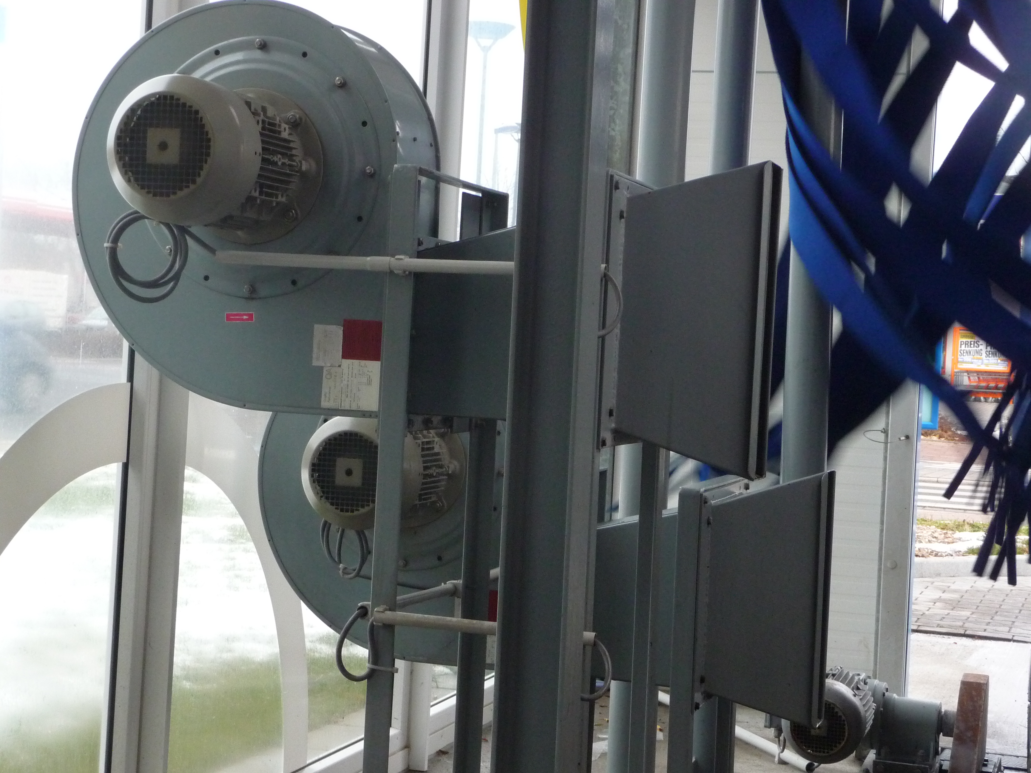 seitliches Hochleistungsgebläse und Trocknungsstreifen in einer Autowaschstraße (fotografiert vom Innenraum des Fahrzeugs)